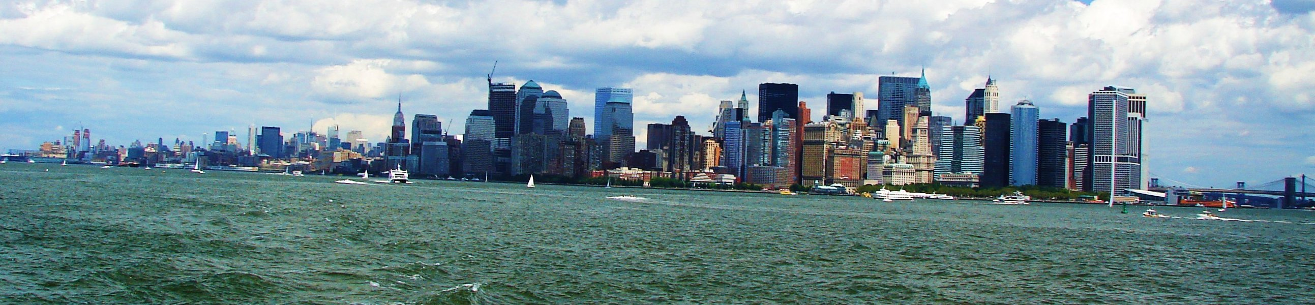 ന്യൂ യോർക്ക് നഗരം ഒരു വിദൂര ദൃശ്യം